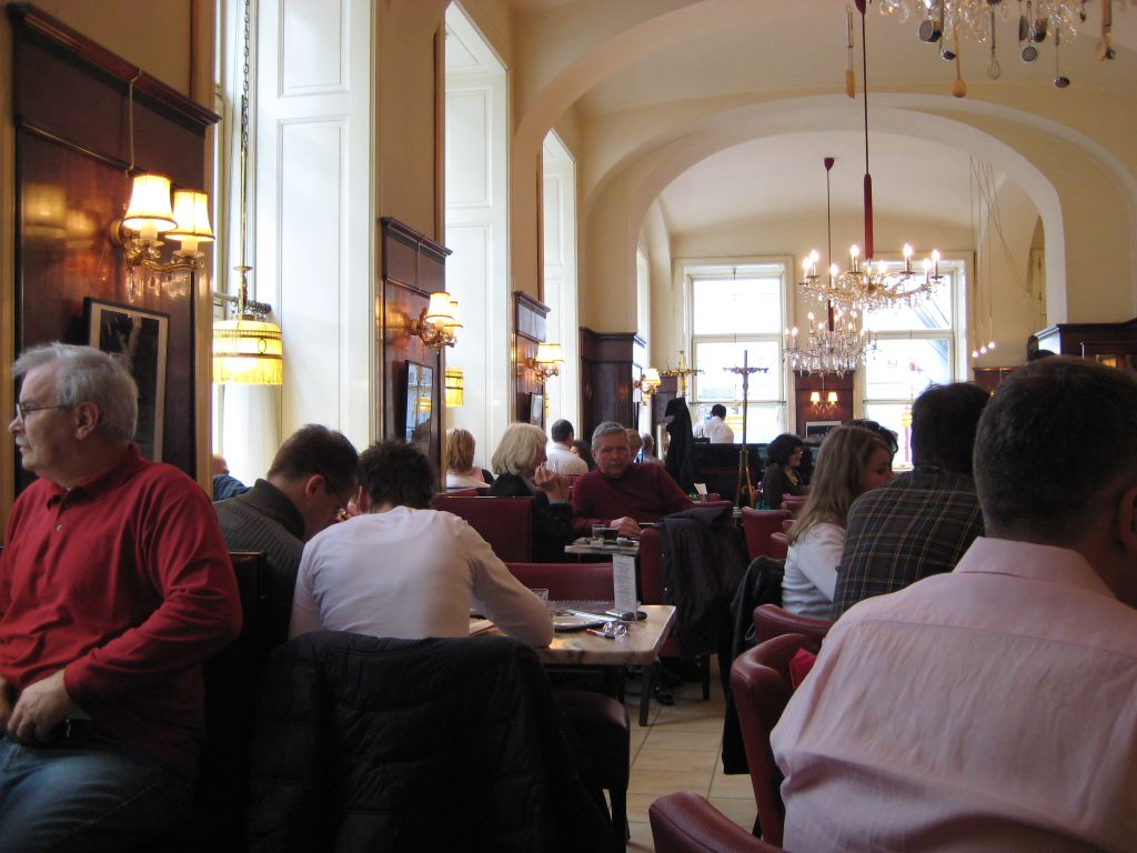 Cafe Diglas in Vienna, inside